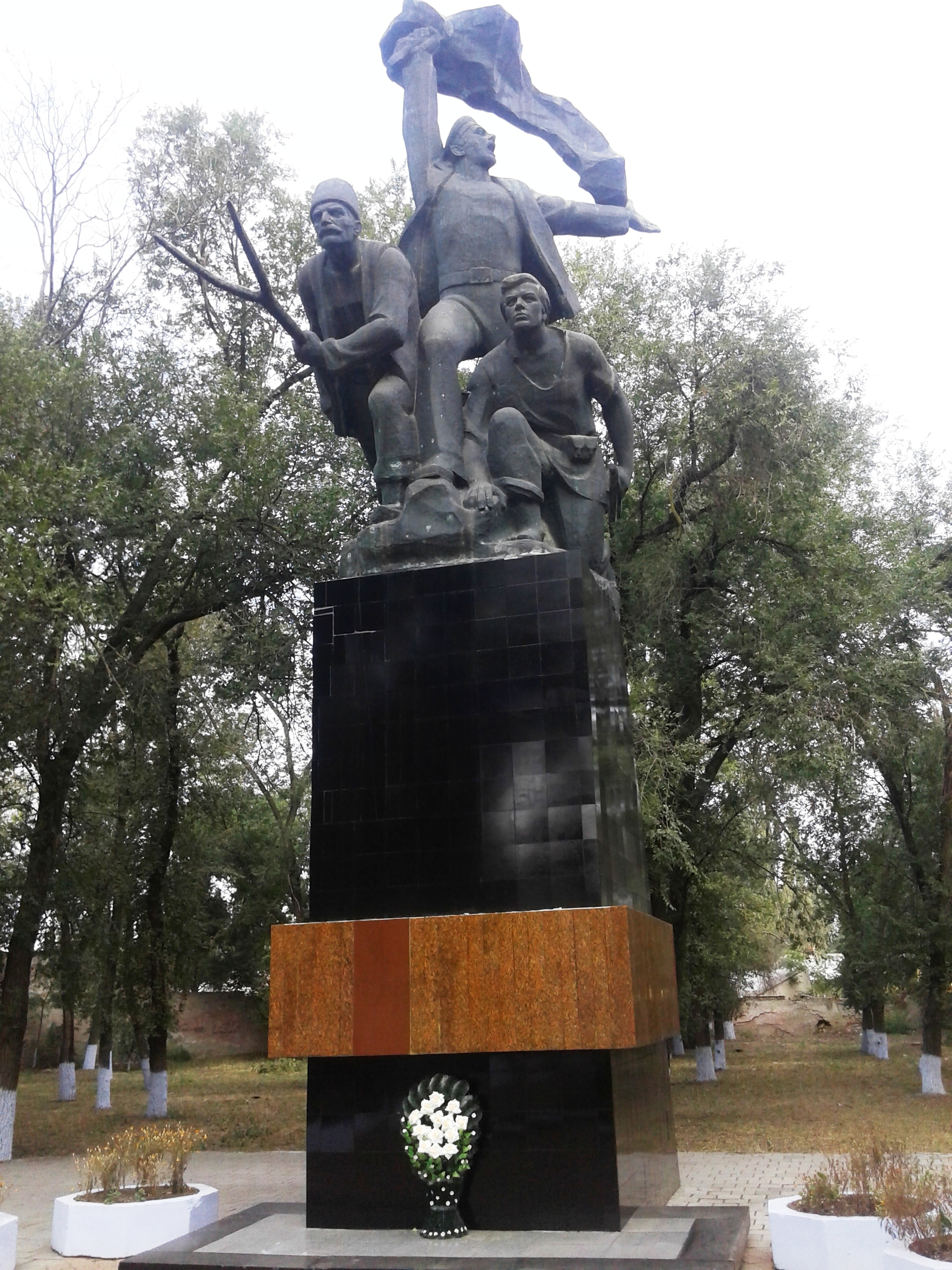 Вікіекспедиція у Буджак